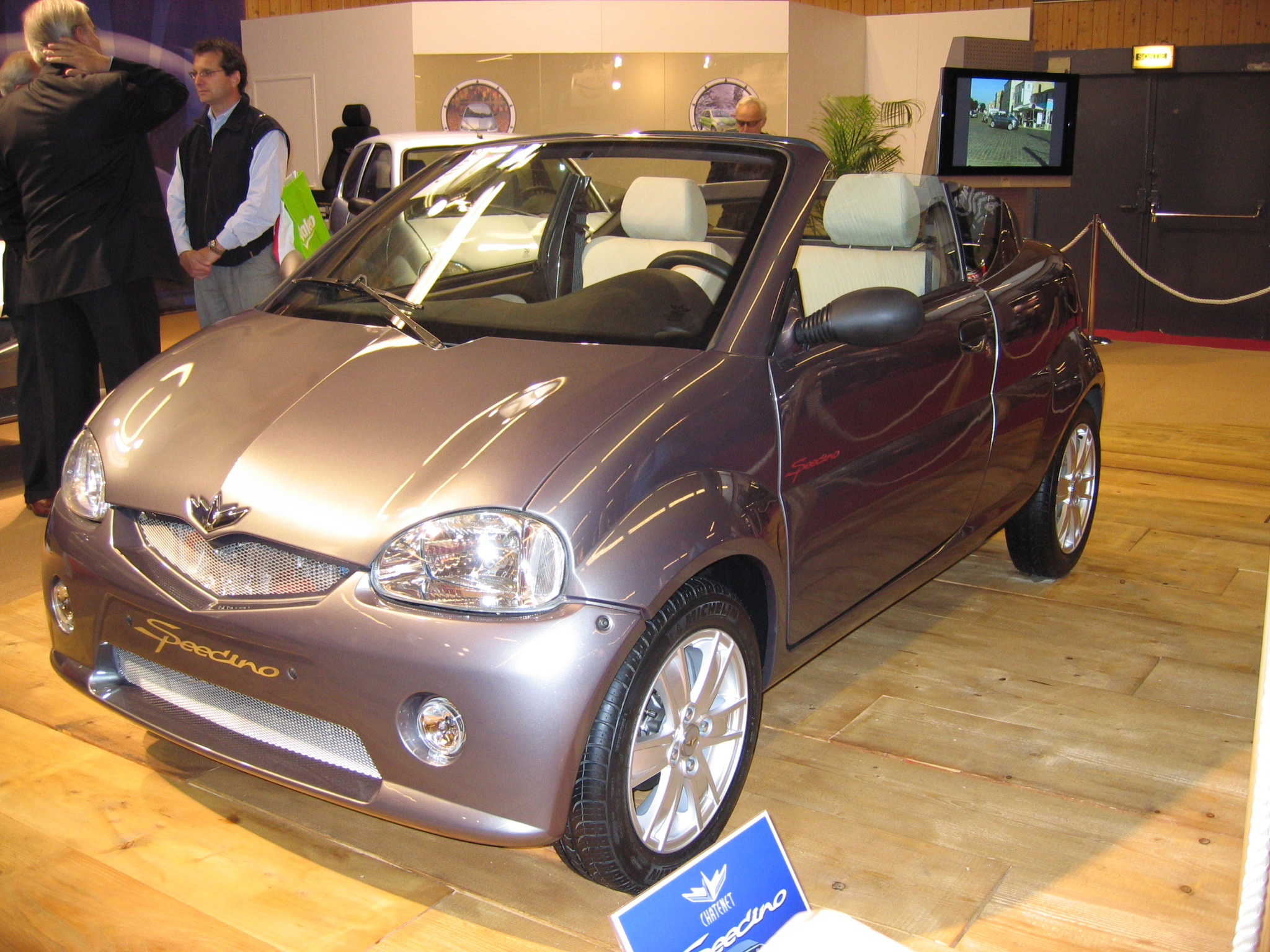 Chatenet Speedino op het Parijse autosalon van 2004.